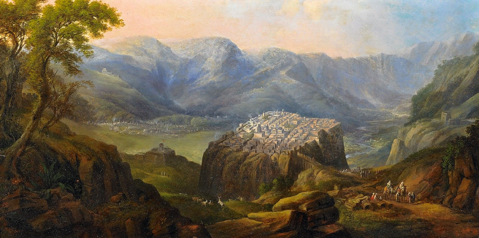 Die Belagerung Masadas (nach "De bello Iudaico"). 1. Hälfte 19. Jh. Öl auf Karton. 41 x 81 cm.